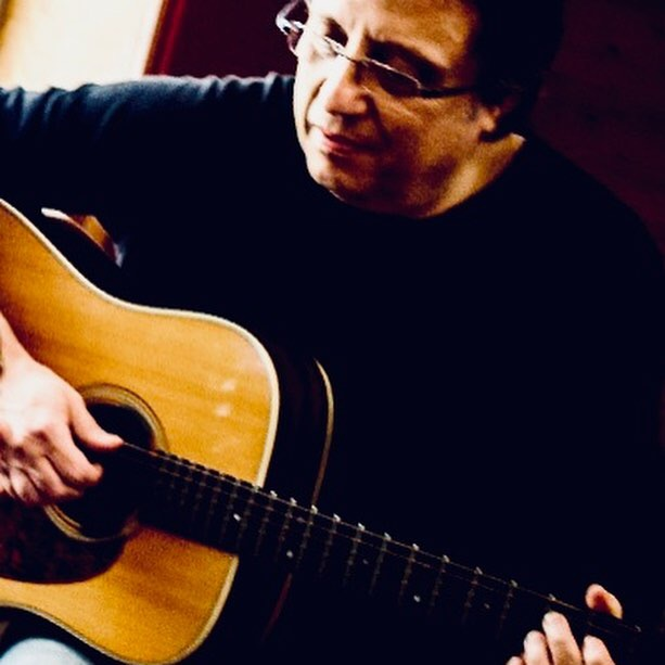 Foto do compositor Otávio Toledo em estúdio